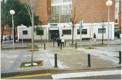 El Centro de Salud Granero Vicedo se inauguró en 1985 y cerró sus puertas definitivamente en 2007